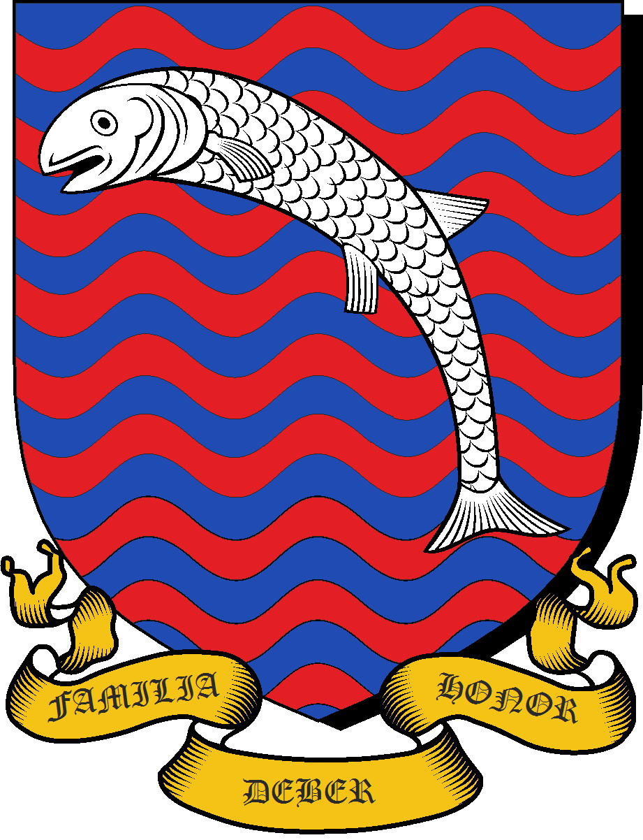 escudo libre en base a el libro cancion de hielo y fuego